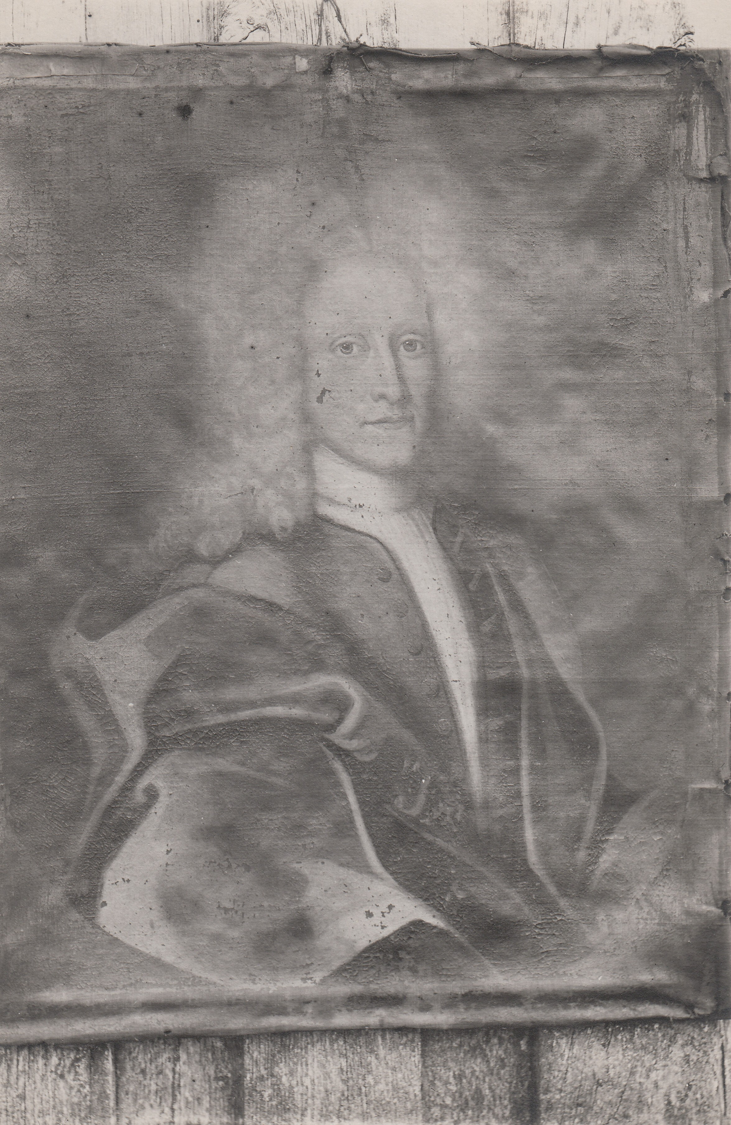 Format: Fotopositiv Dato / Date: Ukjent Fotograf / Photographer: Ukjent Sted / Place: Trondheim Eier / Owner Institution: Trondheim byarkiv, The Municipal Archives of Trondheim Arkivreferanse / Archive reference: Tor.H41.B37.F2756 Peder Broch Angell ble født circa 1698. Han var sønn av Peter Lorentzen Angell og Anna Margretha Pedersdatter Broch. Peder Broch Angell var Fogd på Helgeland circa 1722. Han giftet seg med Anne Margrethe Bredal, datter av Peder Eriksen Bredal og Margrethe Thomasdatter Meyer, i 1726. Peder Broch Angell døde circa 1755. Kilde